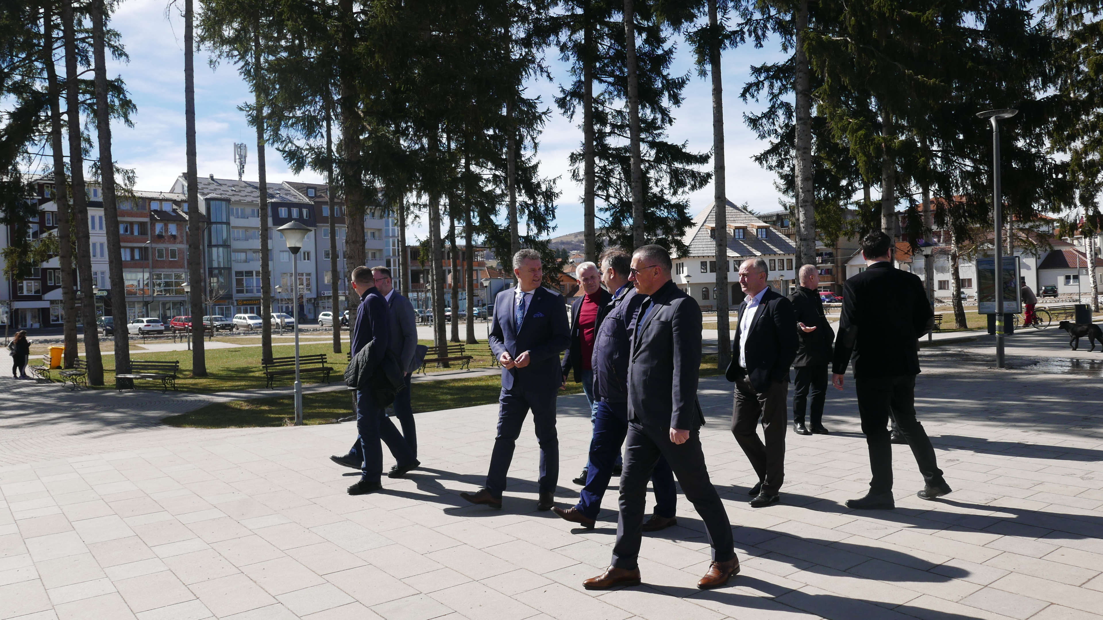 Delegacioni qeveritar i Kosovës në Sjenicë- Sanxhak